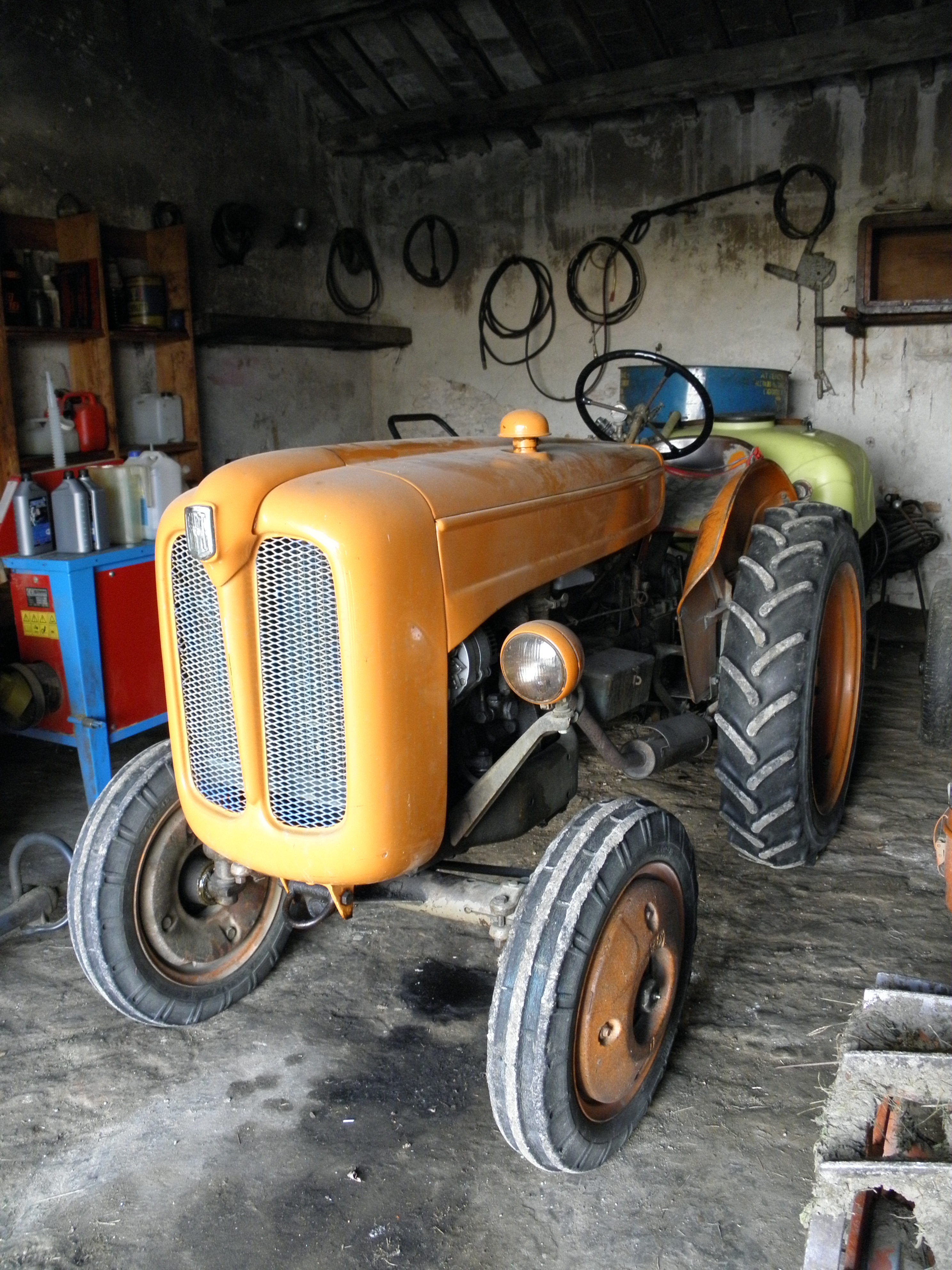 Campoverardo, frazione di Camponogara: il trattore Fiat 211 rimessato a Villa Sargenti, Giantin.